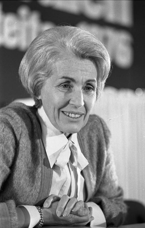 27. Bundesparteitag der F.D.P in Frankfurt am Main